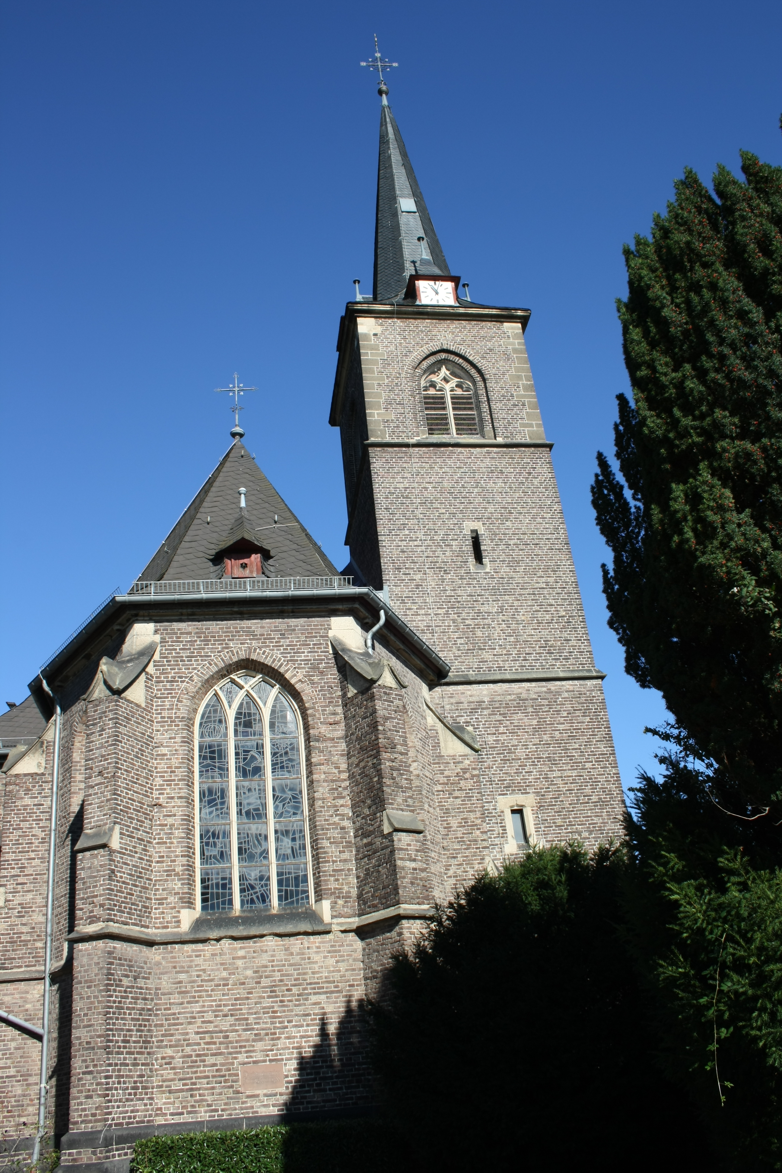 katholische Pfarrkirche St. Johannes Nepomuk in Kripp, Ostansicht mit Chor und Turm